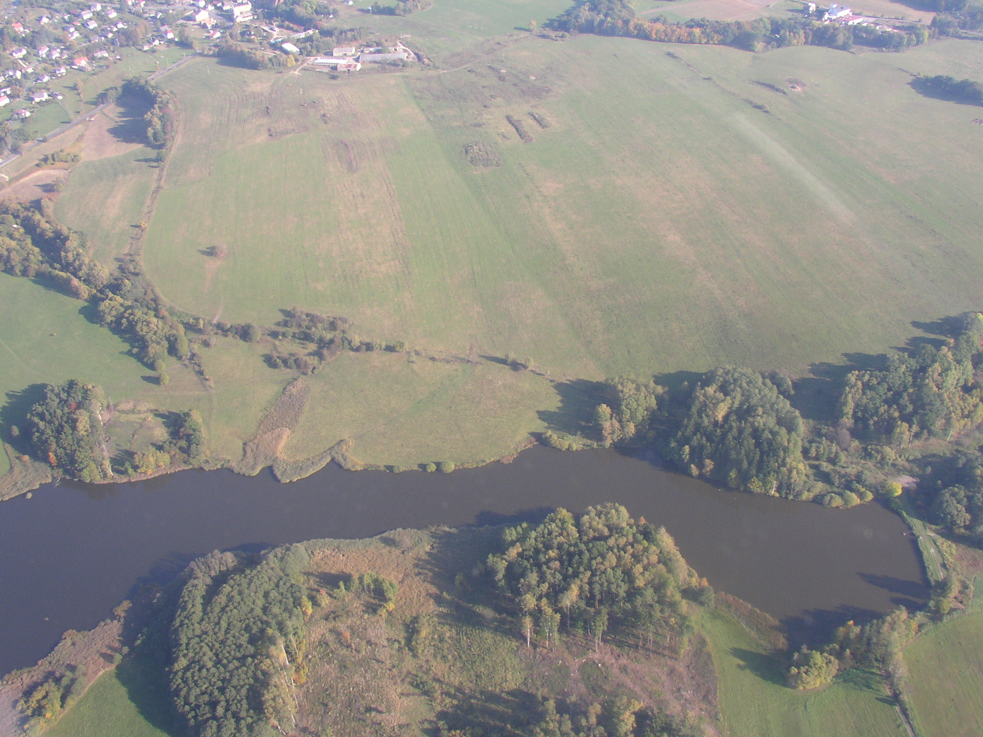 Letecký pohled na Cvikovský rybník, 14. října 2005